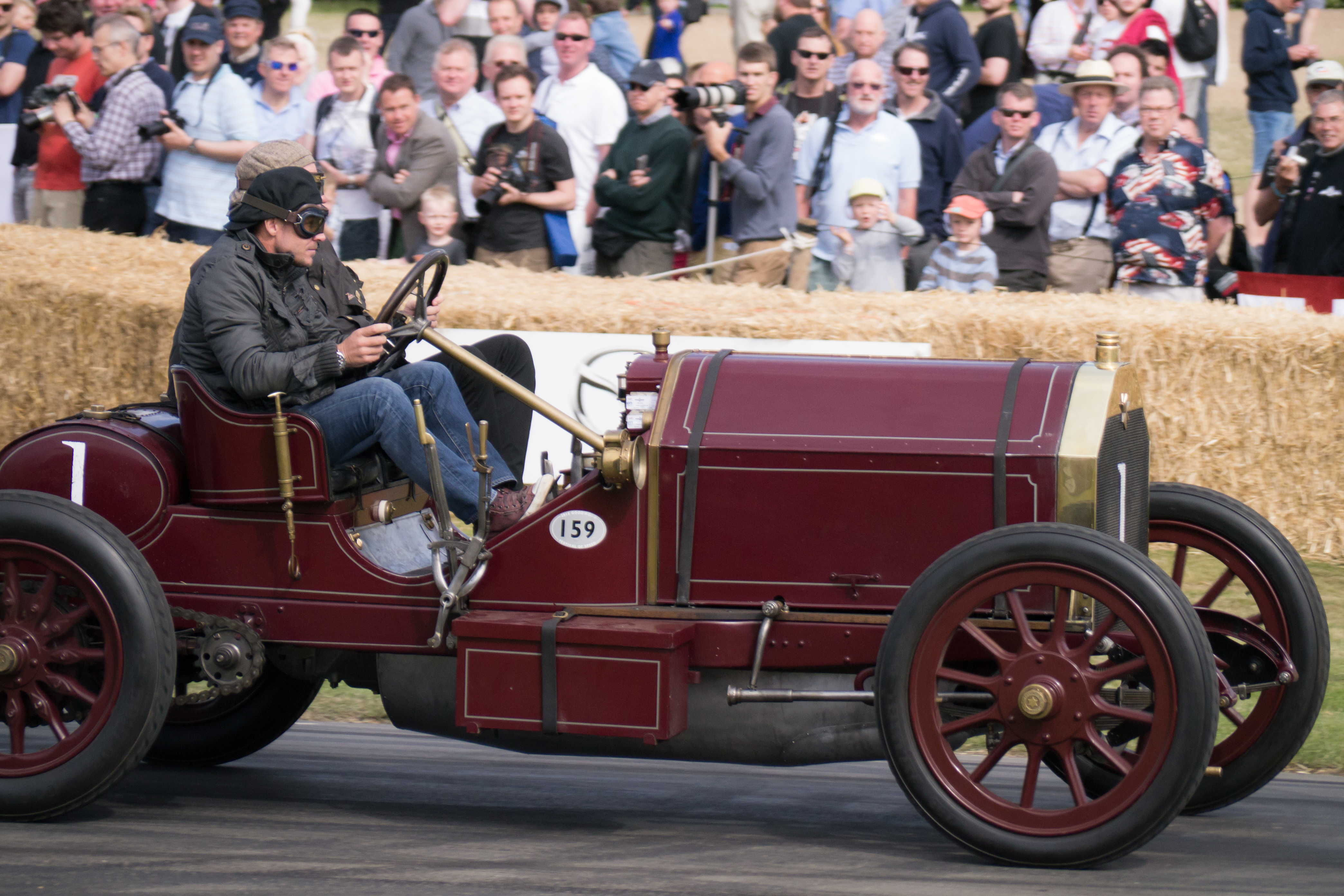 10.2 litre 4-cylinder driven by Felix Baumgartner